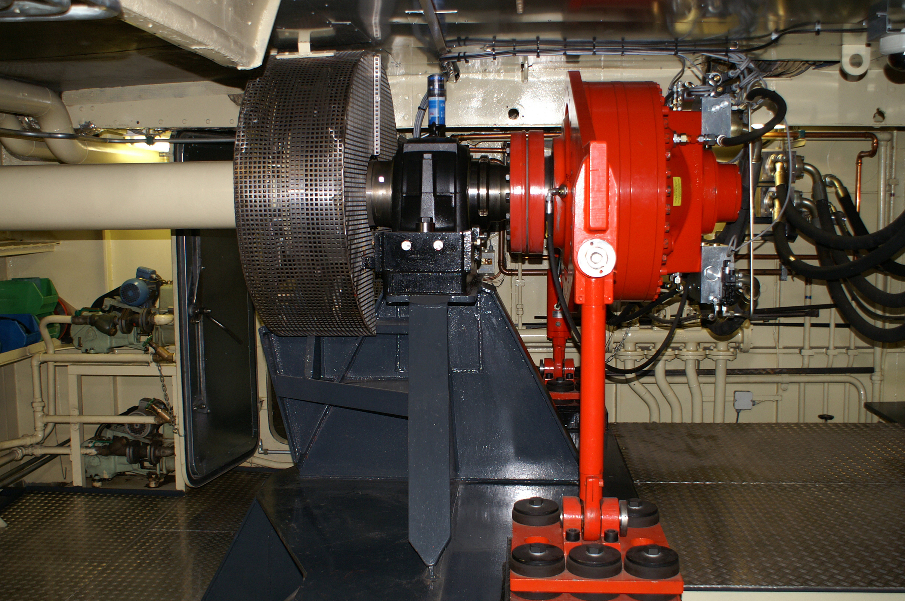 Der direkt auf die Radwelle der Steuerbord-Seitenrads der Goethe angeflanschte Hägglunds-Hydraulikmotor.